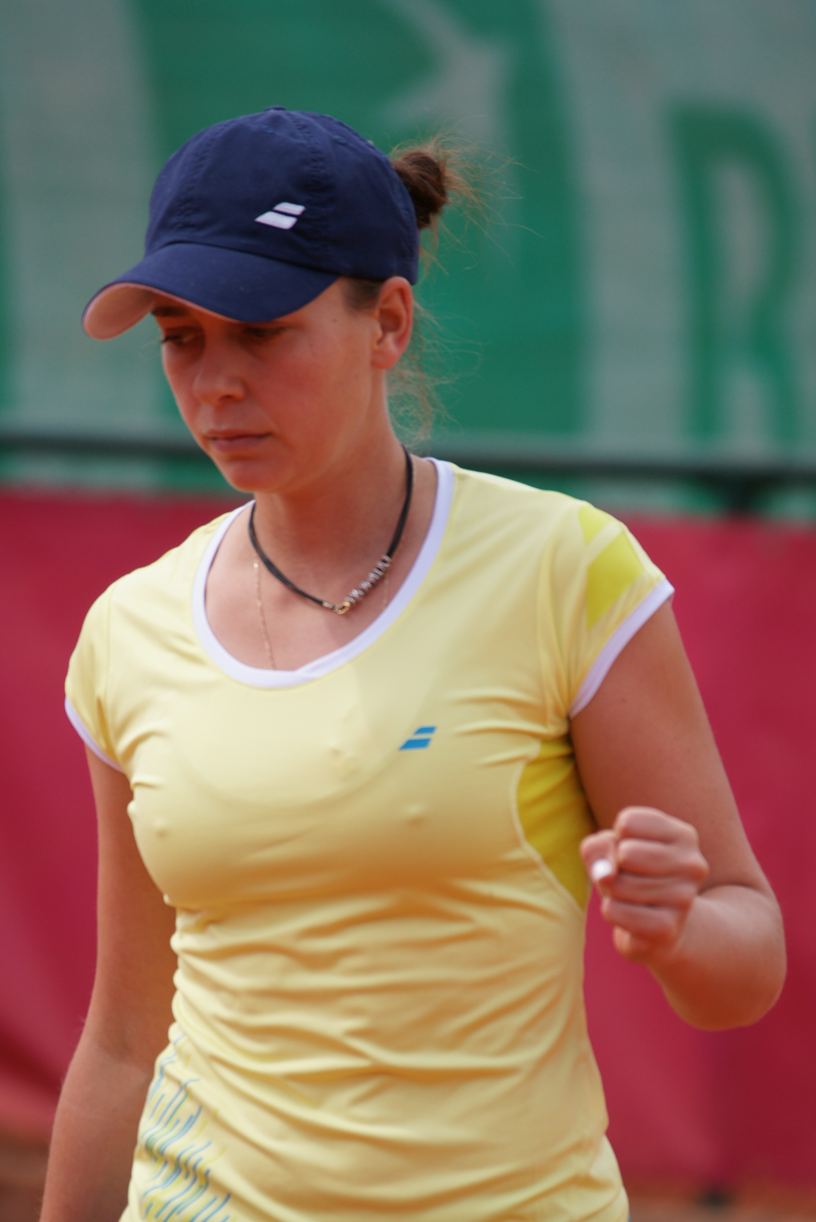 Deniz Khazaniuk Open ITF Cagnes 2016